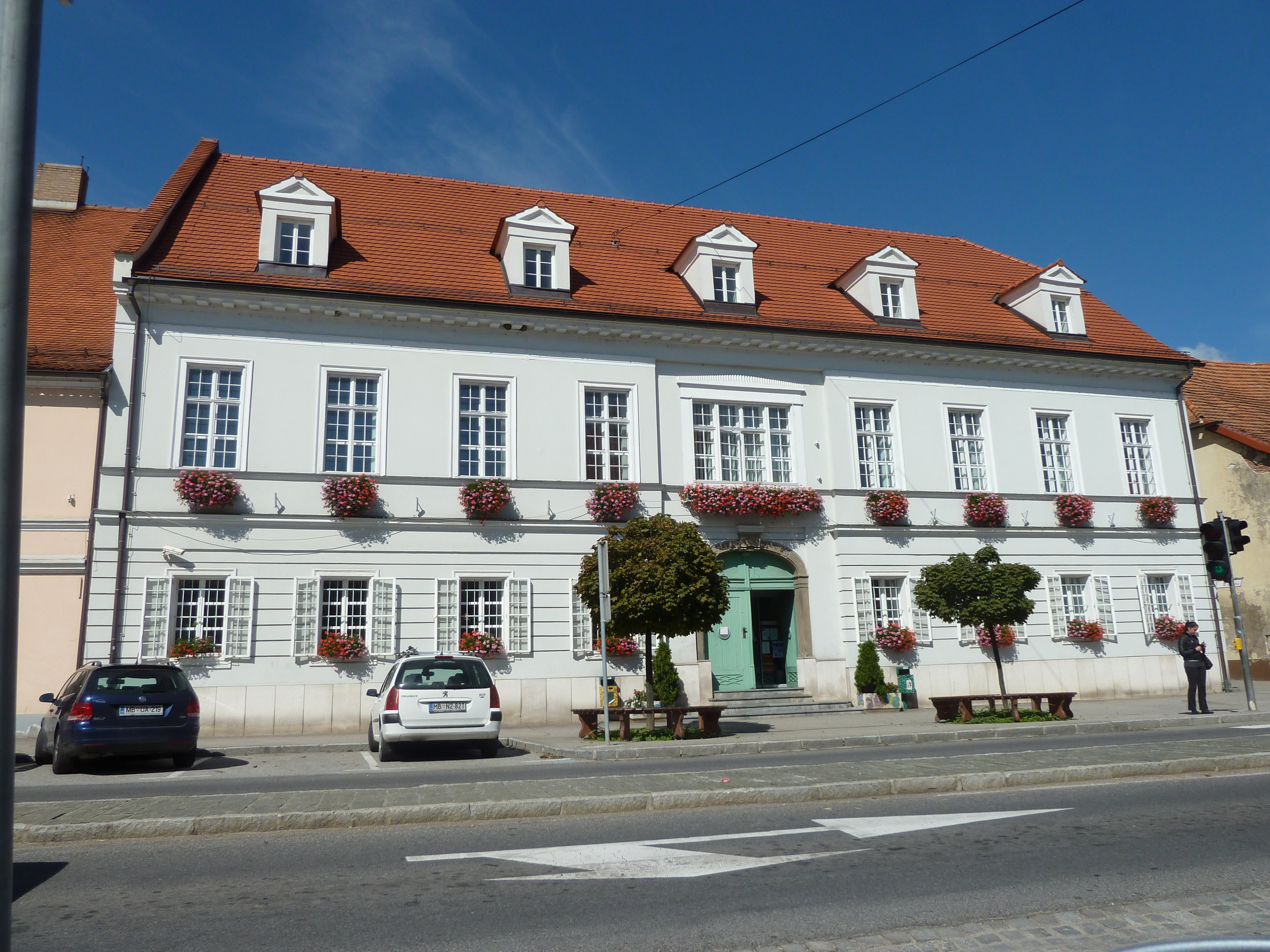 Knjiznica Josipa Vošnjaka 2